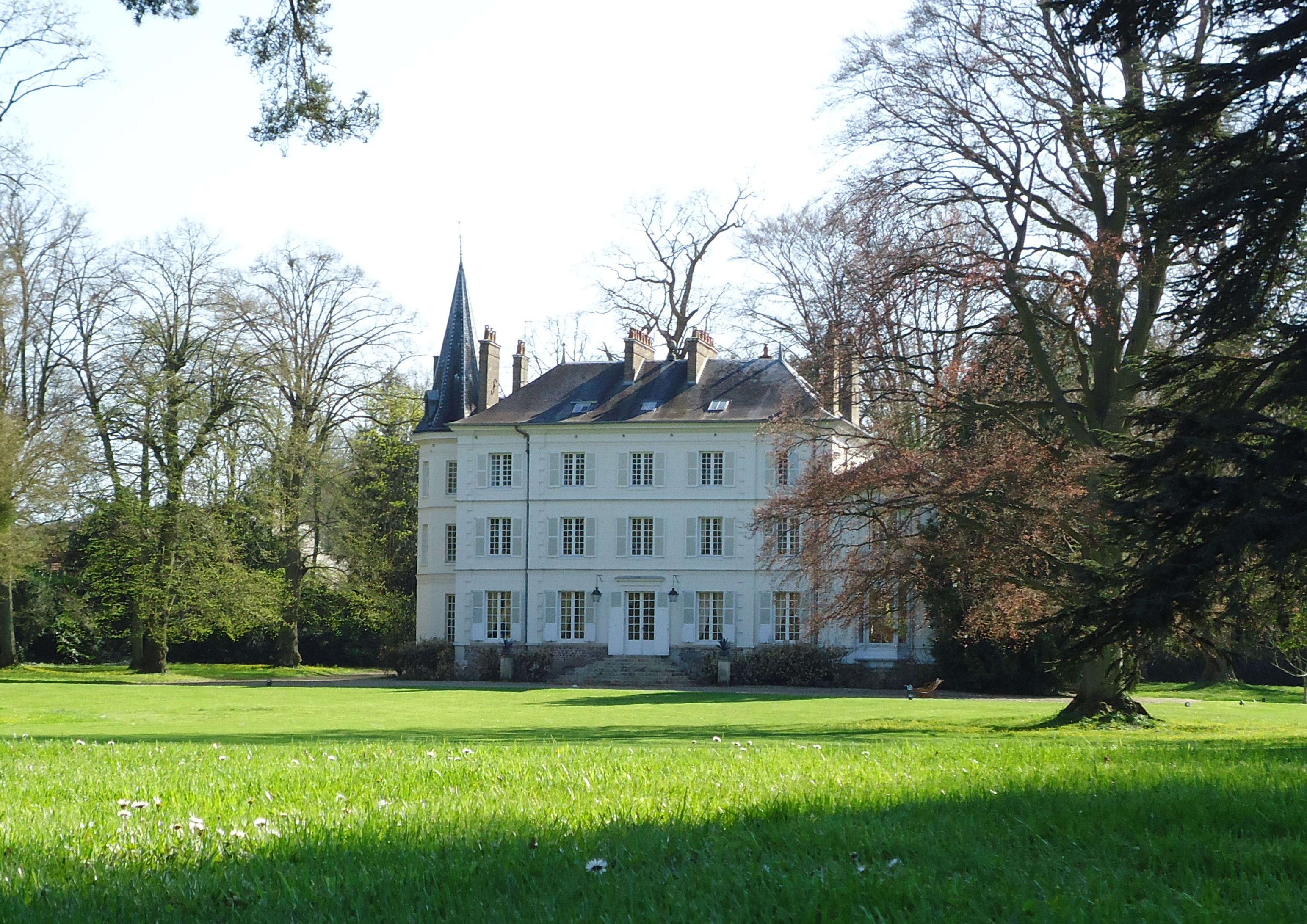 Manoir des Planches - Acquigny - Eure (27)